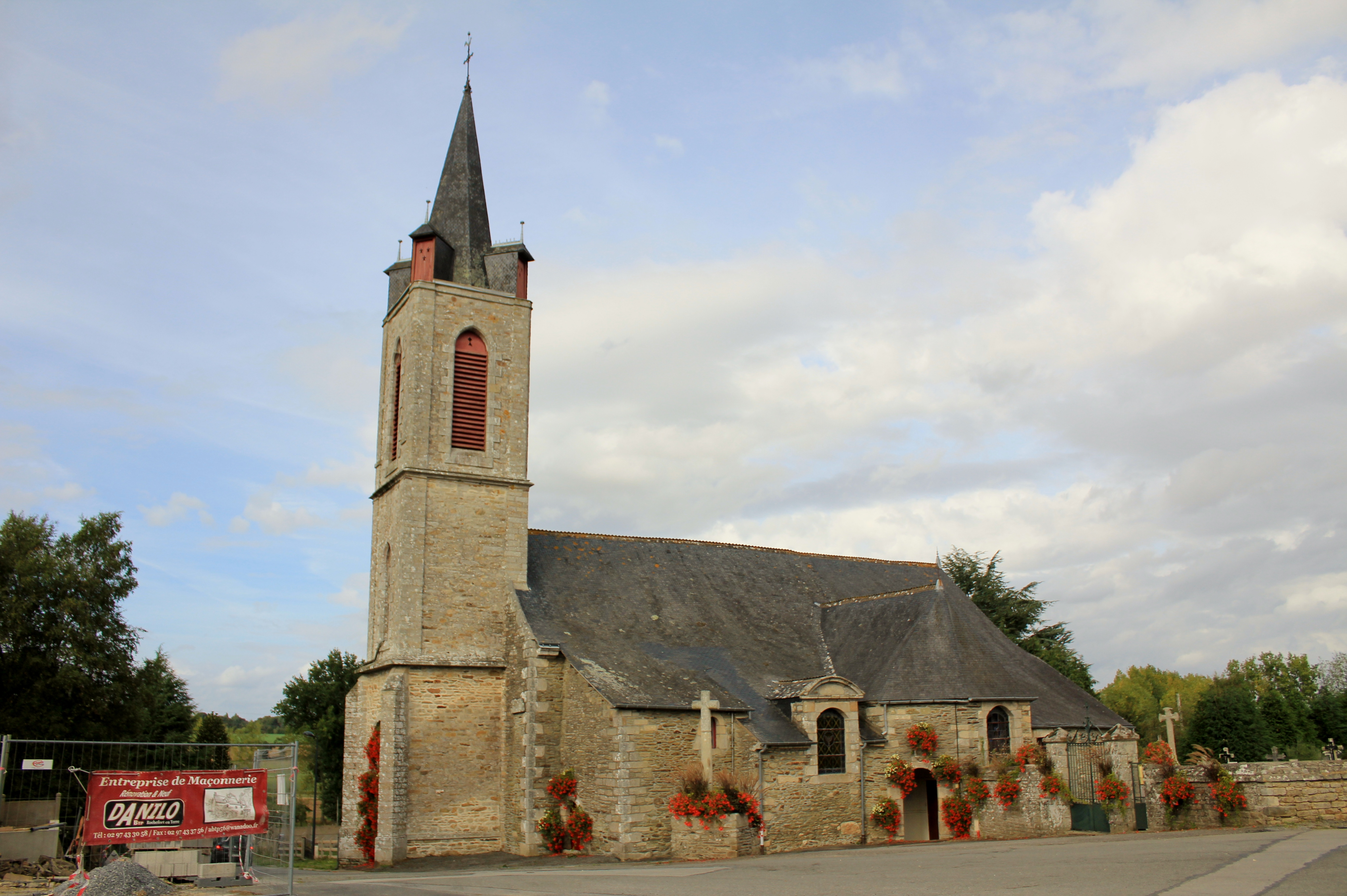 Église Sainte-Croix (La Croix-Helléan) : vue générale